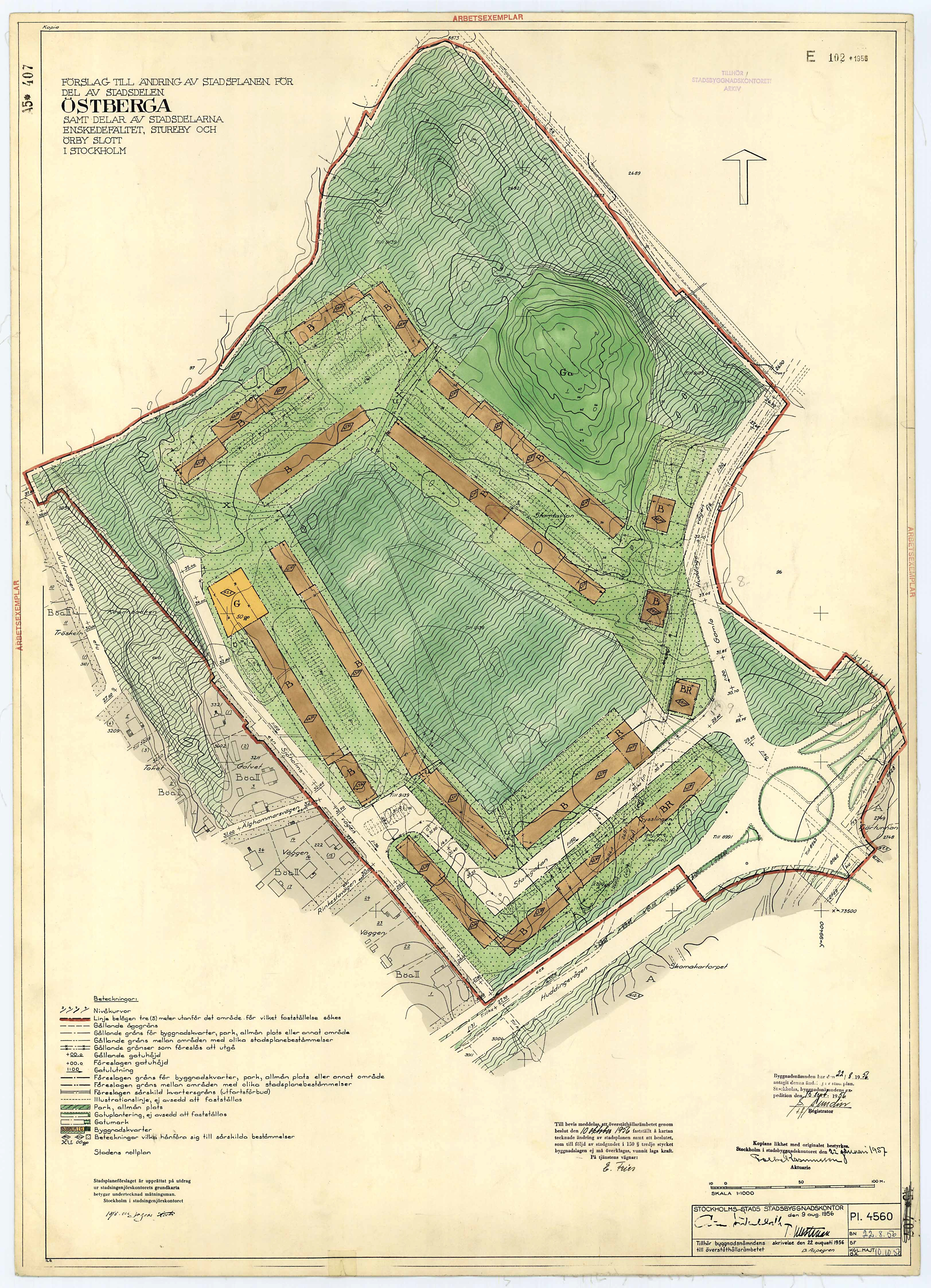 Stadsplan för kvarteret Stamtavlan i Östberga, Stockholm